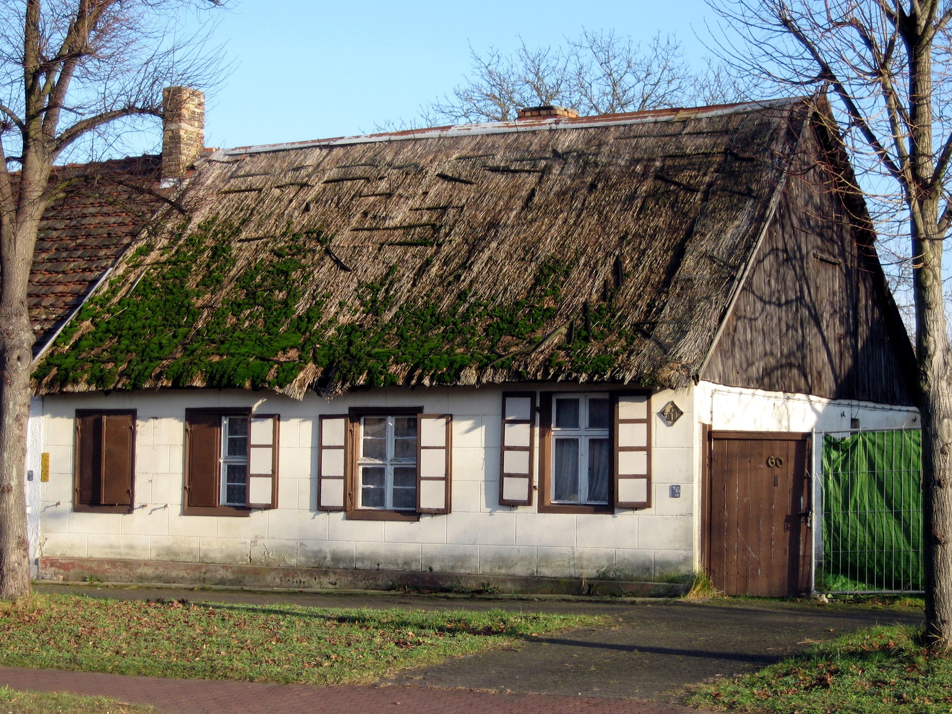 Ältestes erhaltene Gebäude (Kolonistenhaus) des Ortes Schönwalde (Barnim) in der Hauptstraße 60, Gemeinde Wandlitz, Land Brandenburg, Deutschland